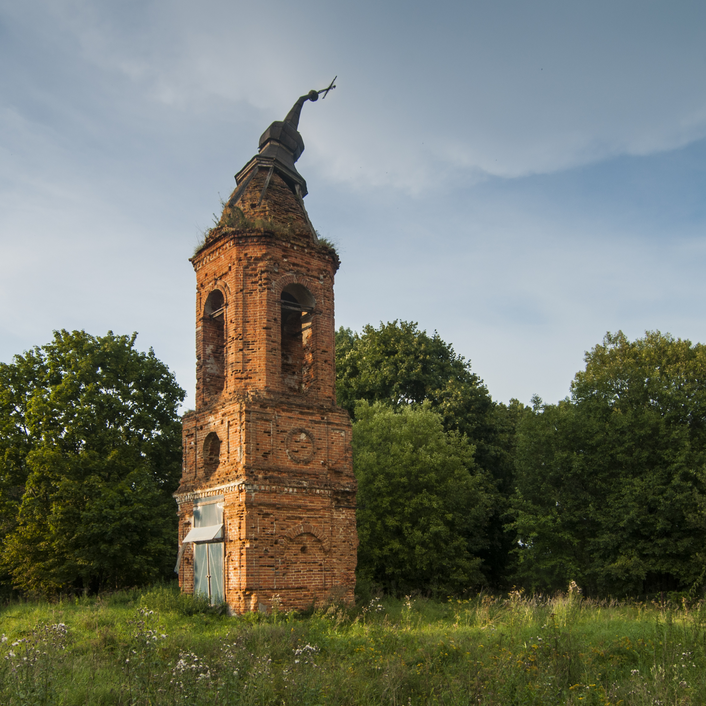 Колокольня церкви св. Варвары: Матчино, Козельский район, Калужская область